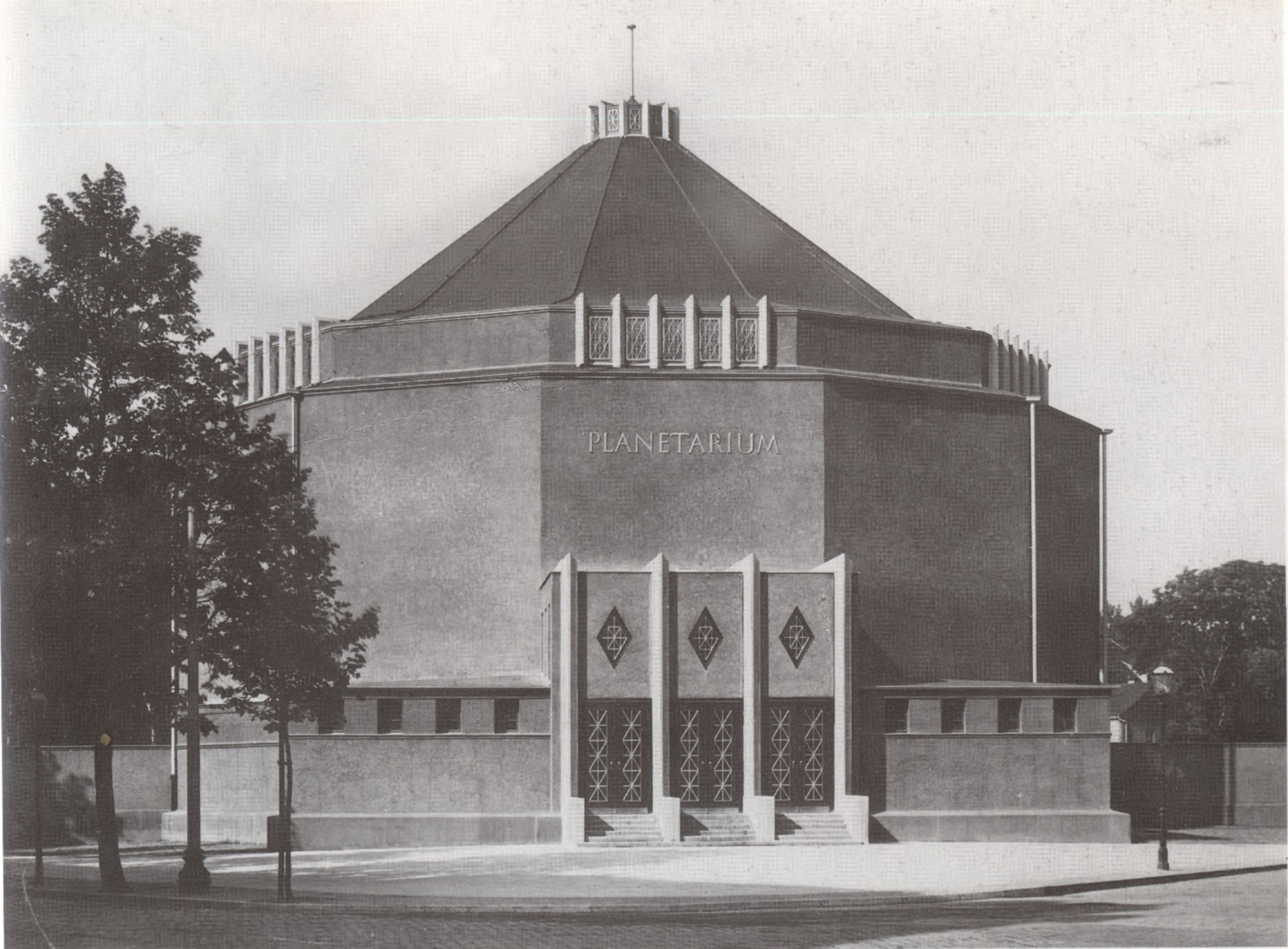 Das Planetarium in der Pfaffendorfer Straße Ecke Kickerlingsberg um 1927. Das Planetarium wurde am 20. Mai 1926 eingeweiht und fasste 600 Zuschauer. Es wurde am 4. Dezember 1943 durch einen Bombenangriff zerstört und nicht wieder aufgebaut.